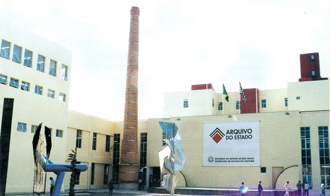 Arquivo do Estado, São Paulo, Brasil